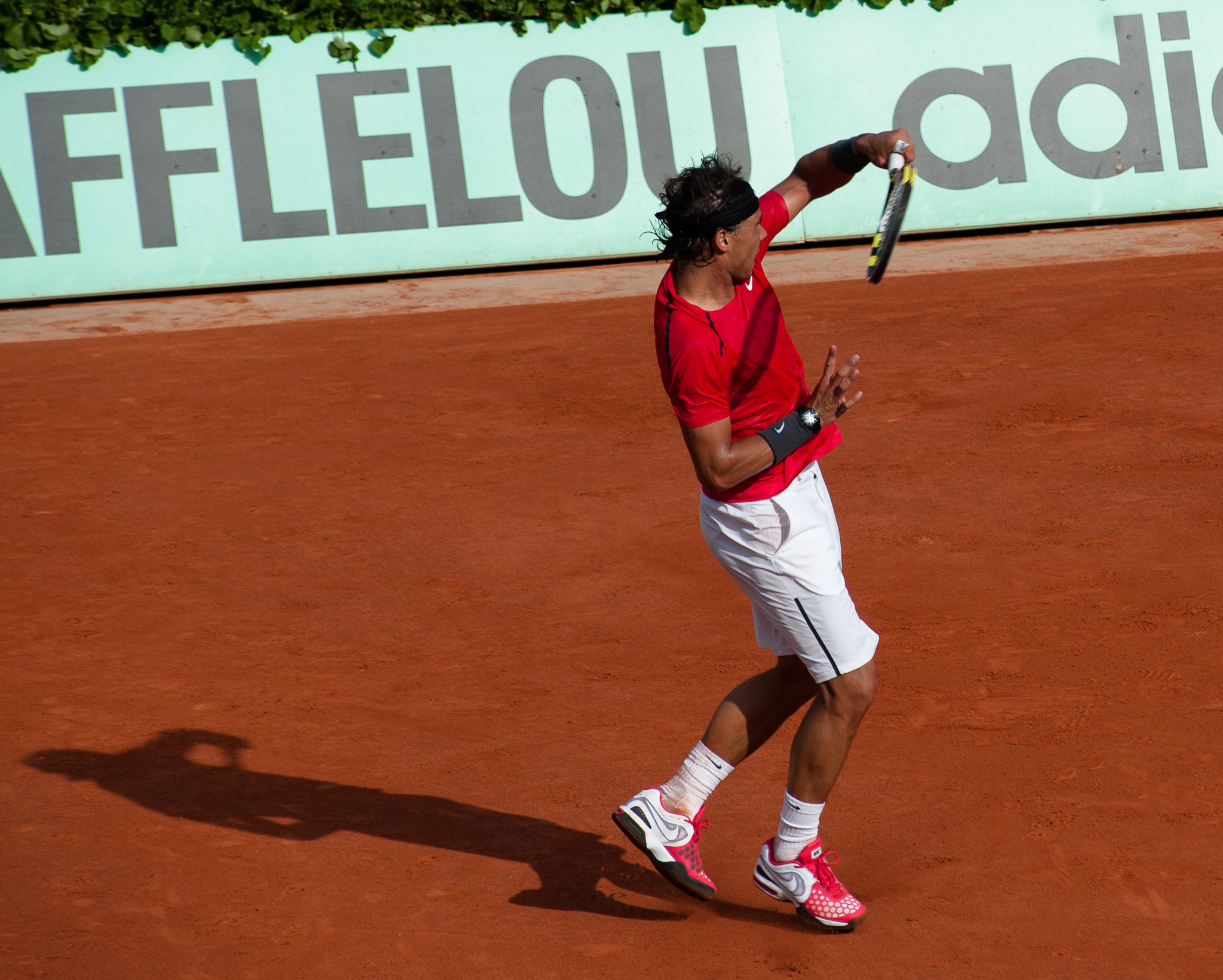 Rafael Nadal, Roland-Garros 2012.